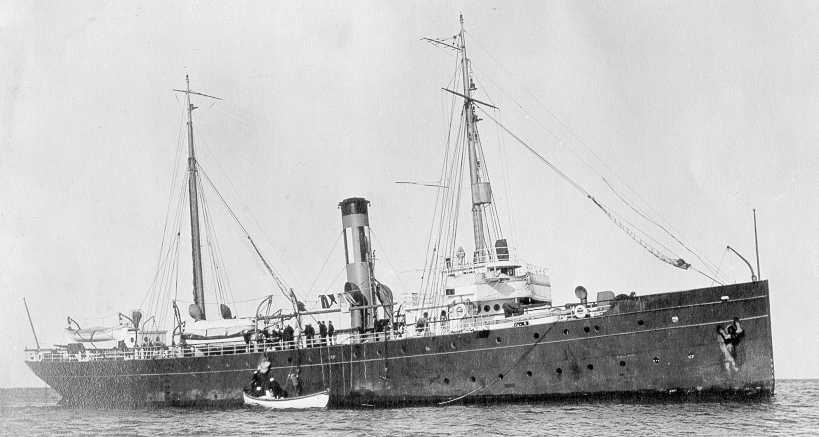 US Revenue Cutter Seneca, circa 1914.